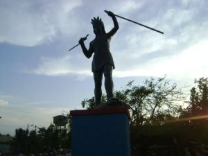 Cacique Yape